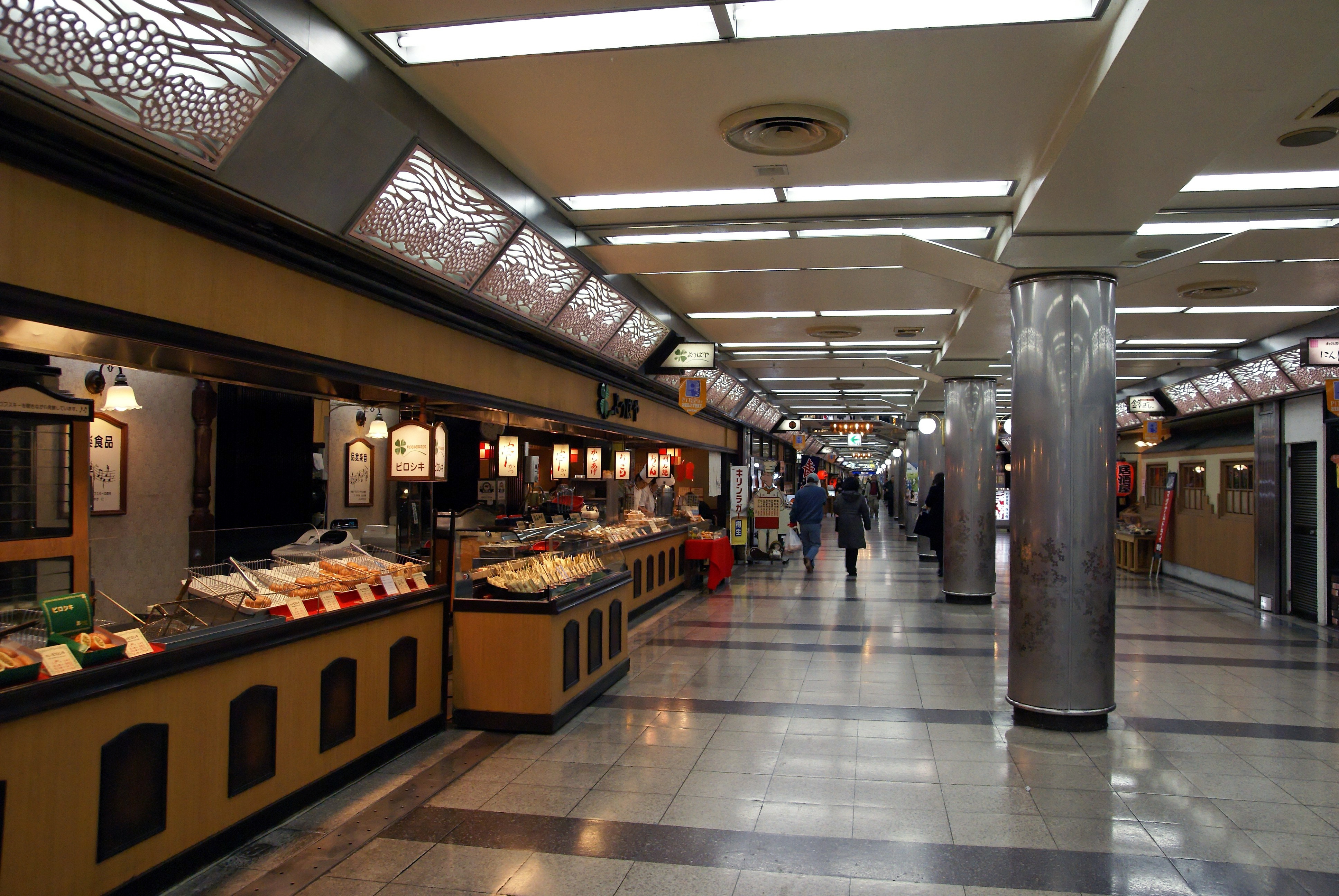 Metro Kobe in Kobe, Hyogo, Japan